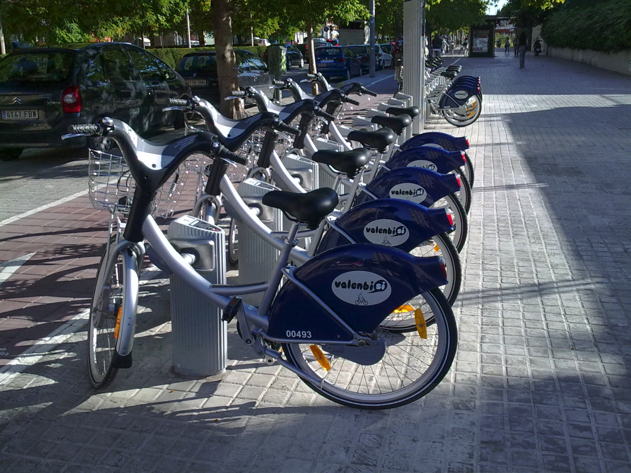 Estación con bicis del servicio Valenbisi. Valencia (España).